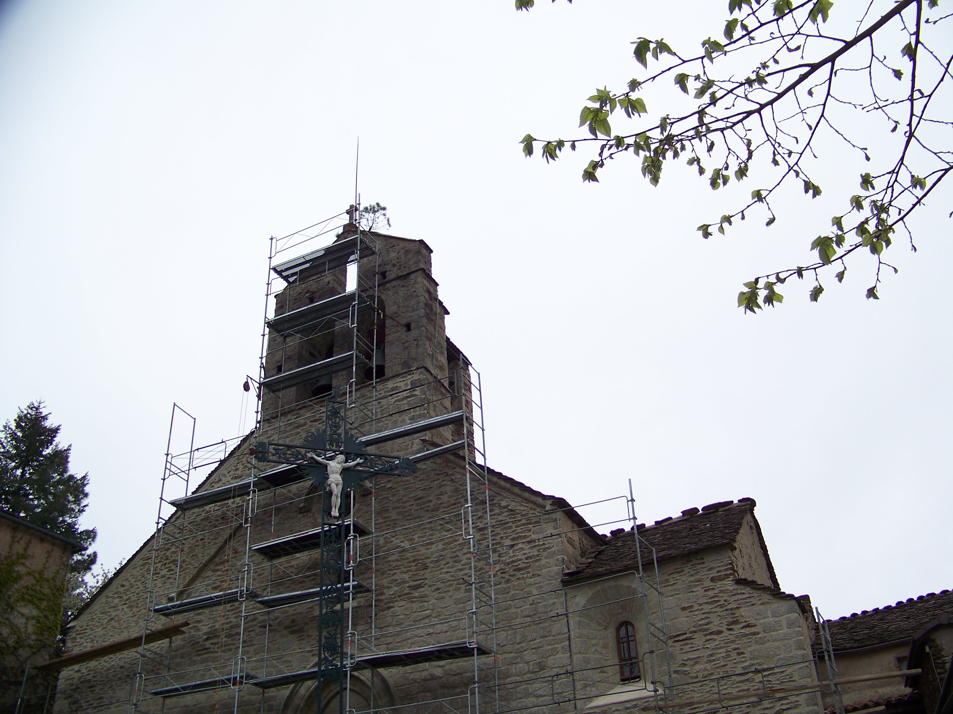 église de Beaumont en réfection